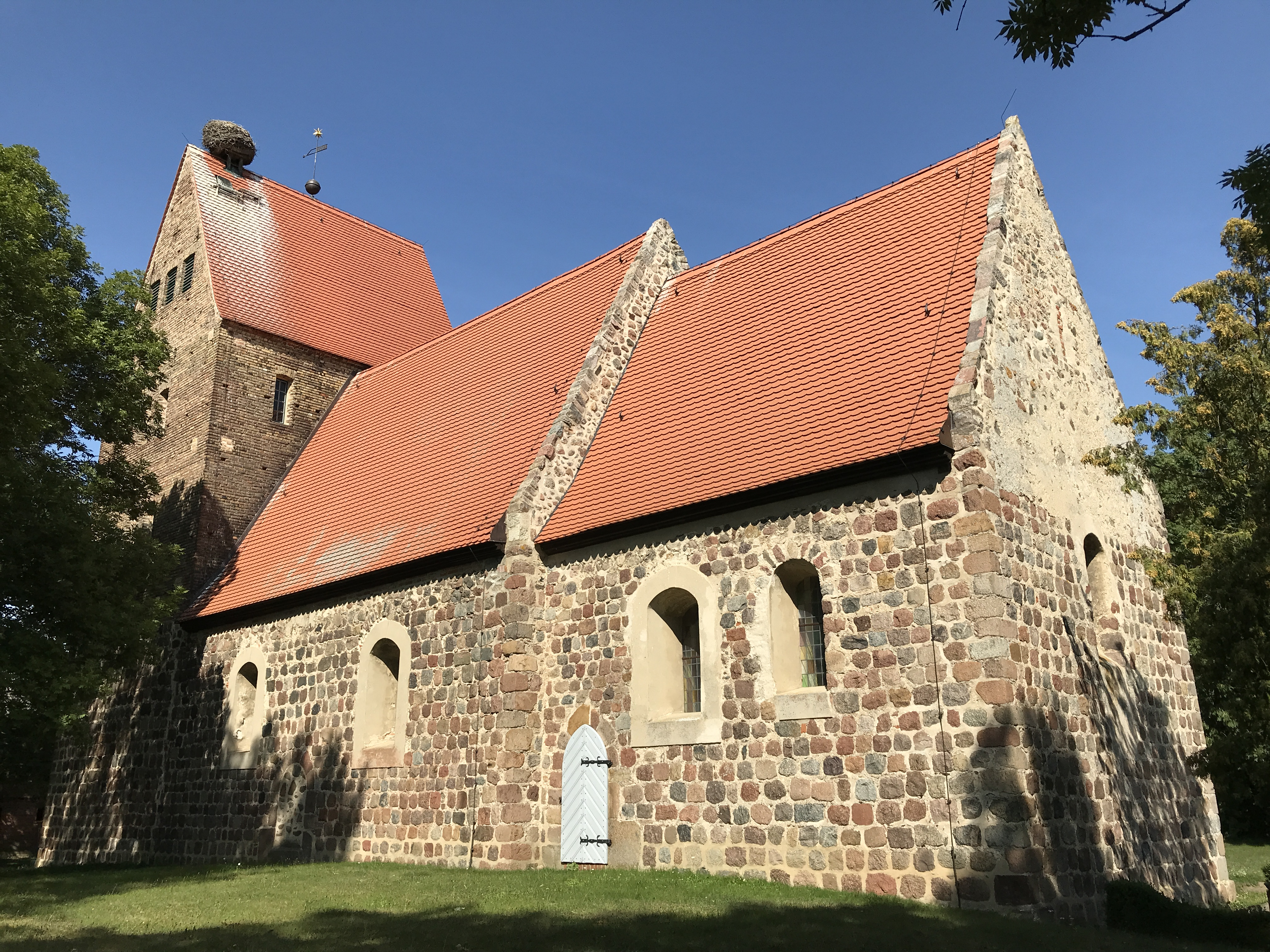 Im Innern steht unter anderem ein Altarretabel aus dem 18. Jahrhundert.